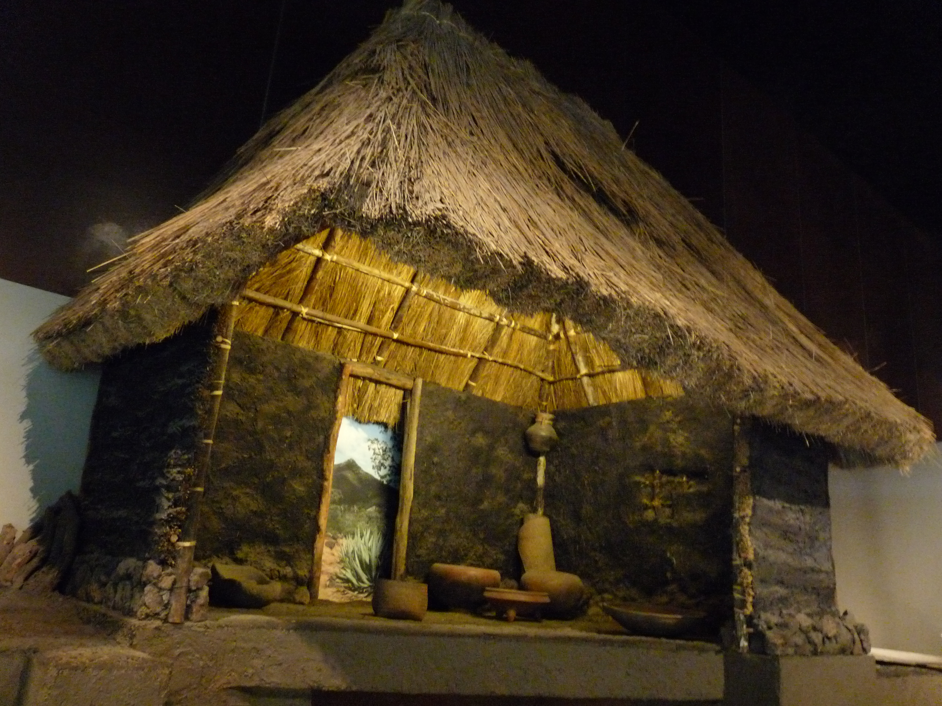 Reconstitución de una casa preclásica de Tlatilco (Museo Nacional de Antropología de México).